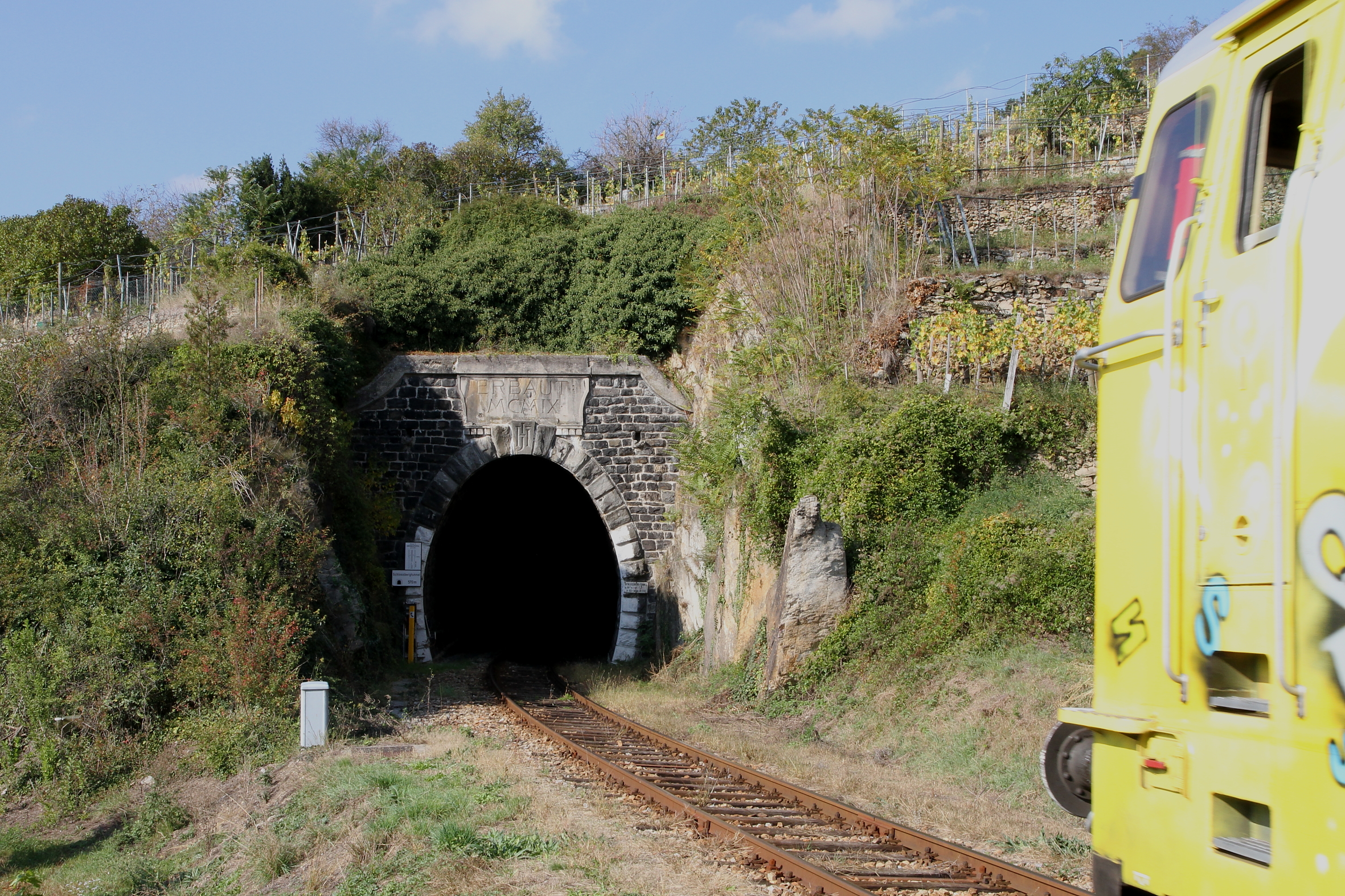 Südostportal des Schlossberg-Tunnels der Wachauer- bzw. Donauuferbahn in Dürnstein.